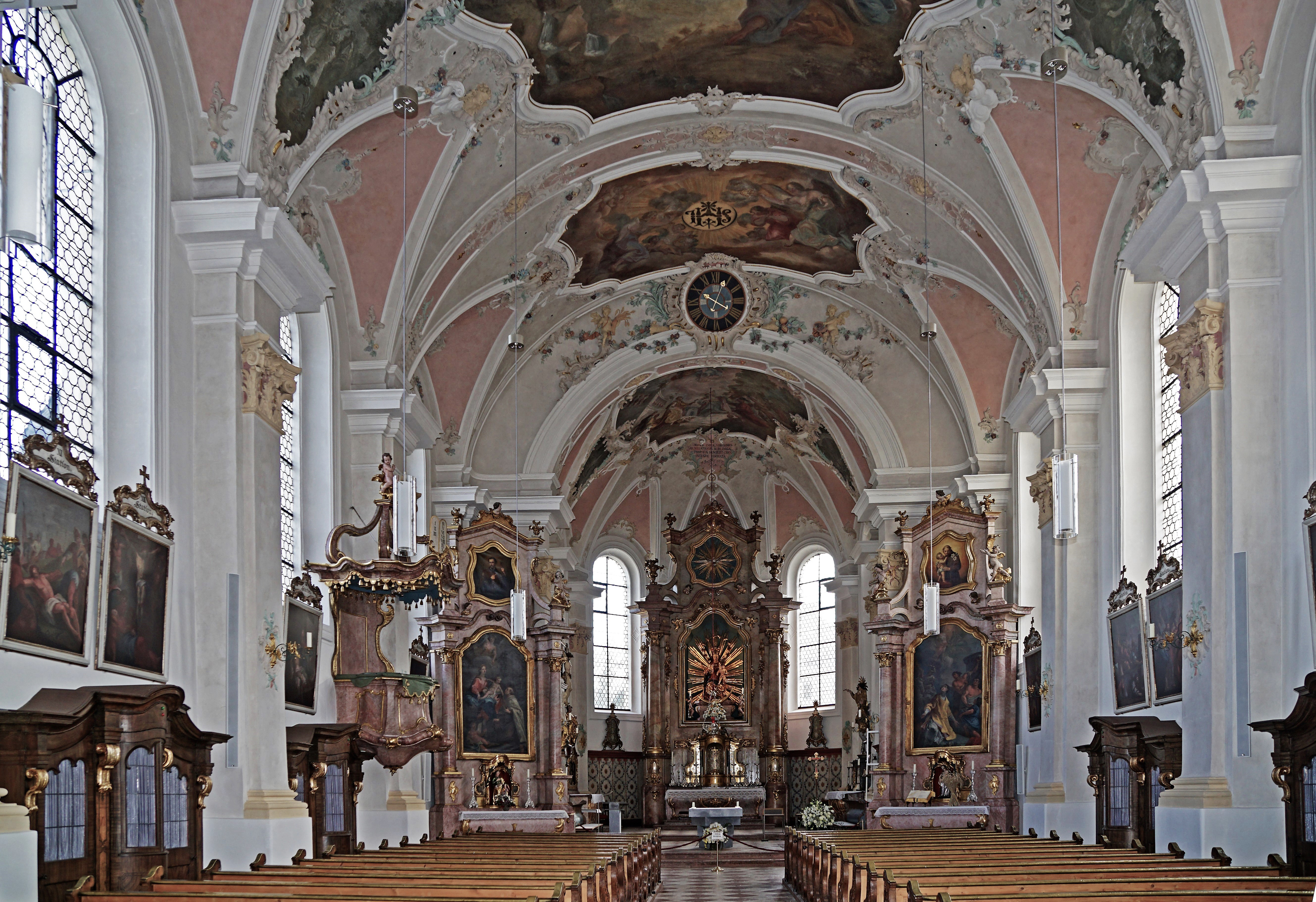 Pfarrkirche Mariä Himmelfahrt (Bad Aibling), Innenansicht